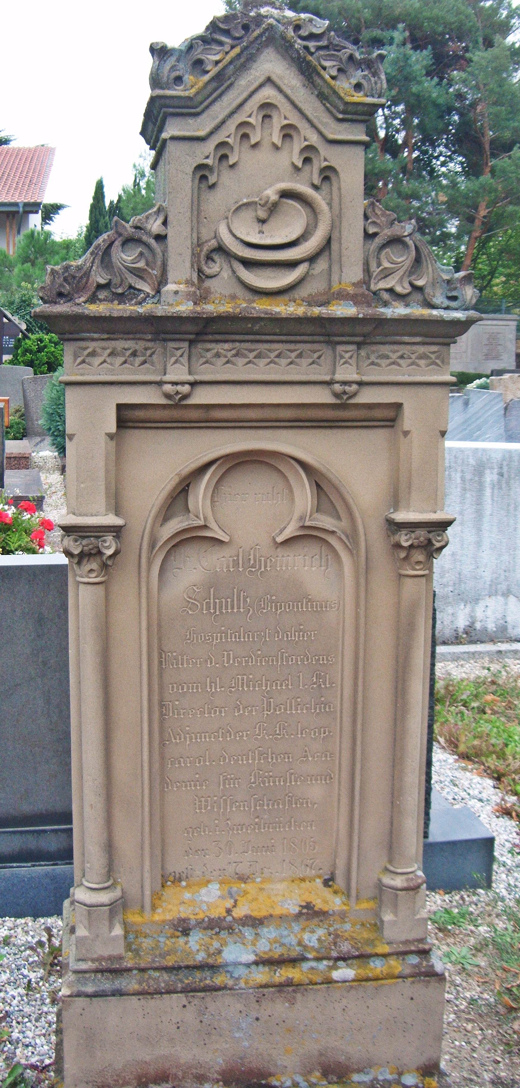 Carl Heinrich Schultz (1805-1867), Mediziner und Botaniker, Grabstein, Friedhof Deidesheim